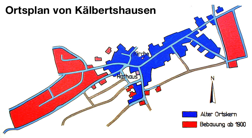 Ortsplan von Hüffenhardt-Kälbertshausen mit farbiger Markierung des historischen Siedlungskerns vor 1900 und den Erweiterungen nachfolgender Jahre.